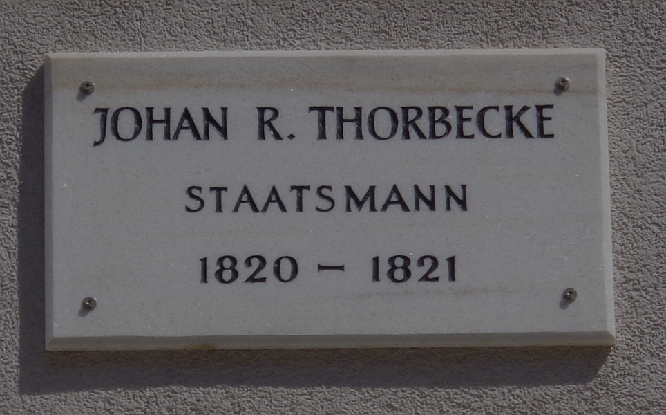 Göttinger Gedenktafel für Johan Rudolf Thorbecke (Stumpfebiel 13)